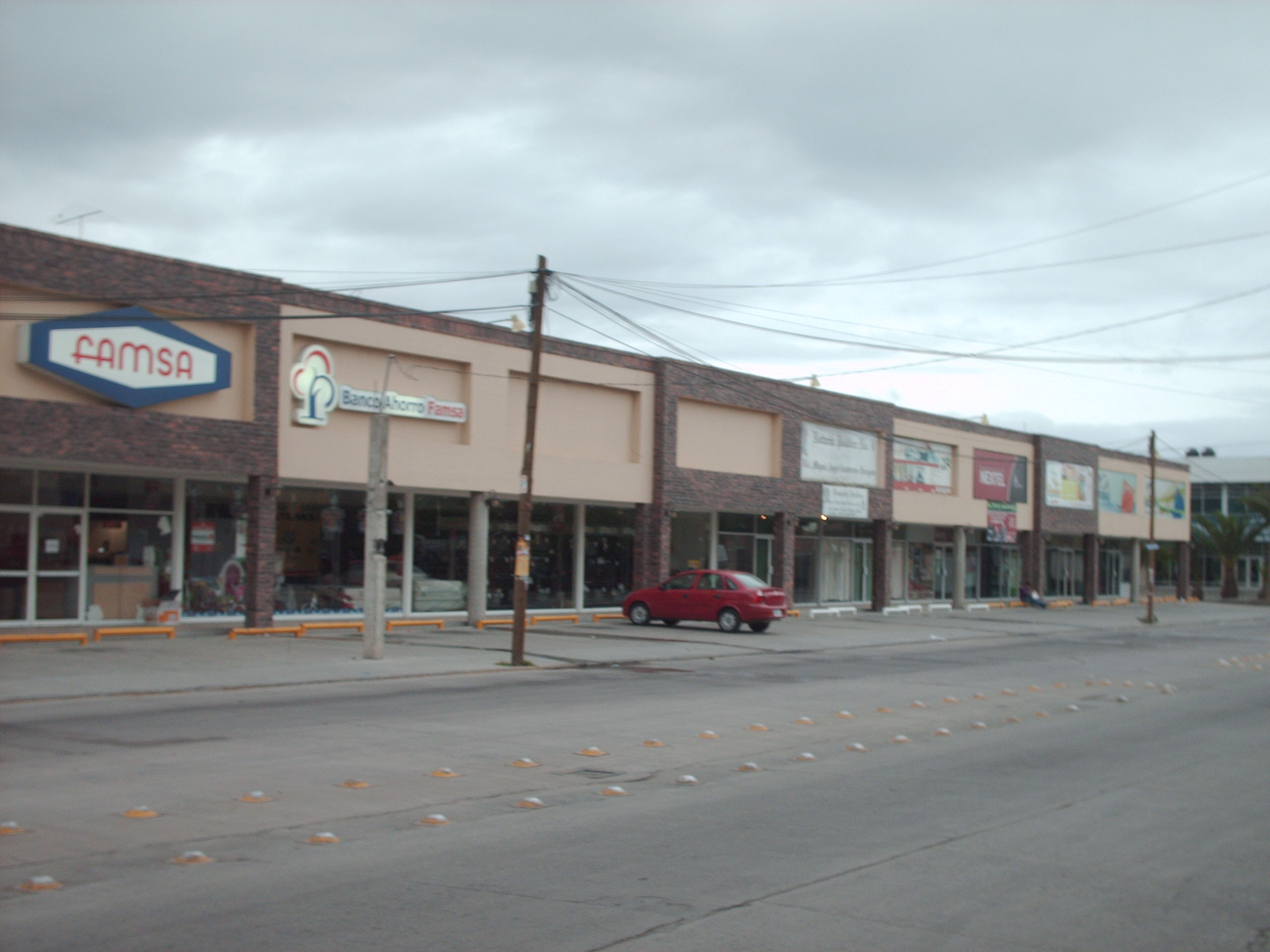 Plaza Diamante en San Francisco del Rincón